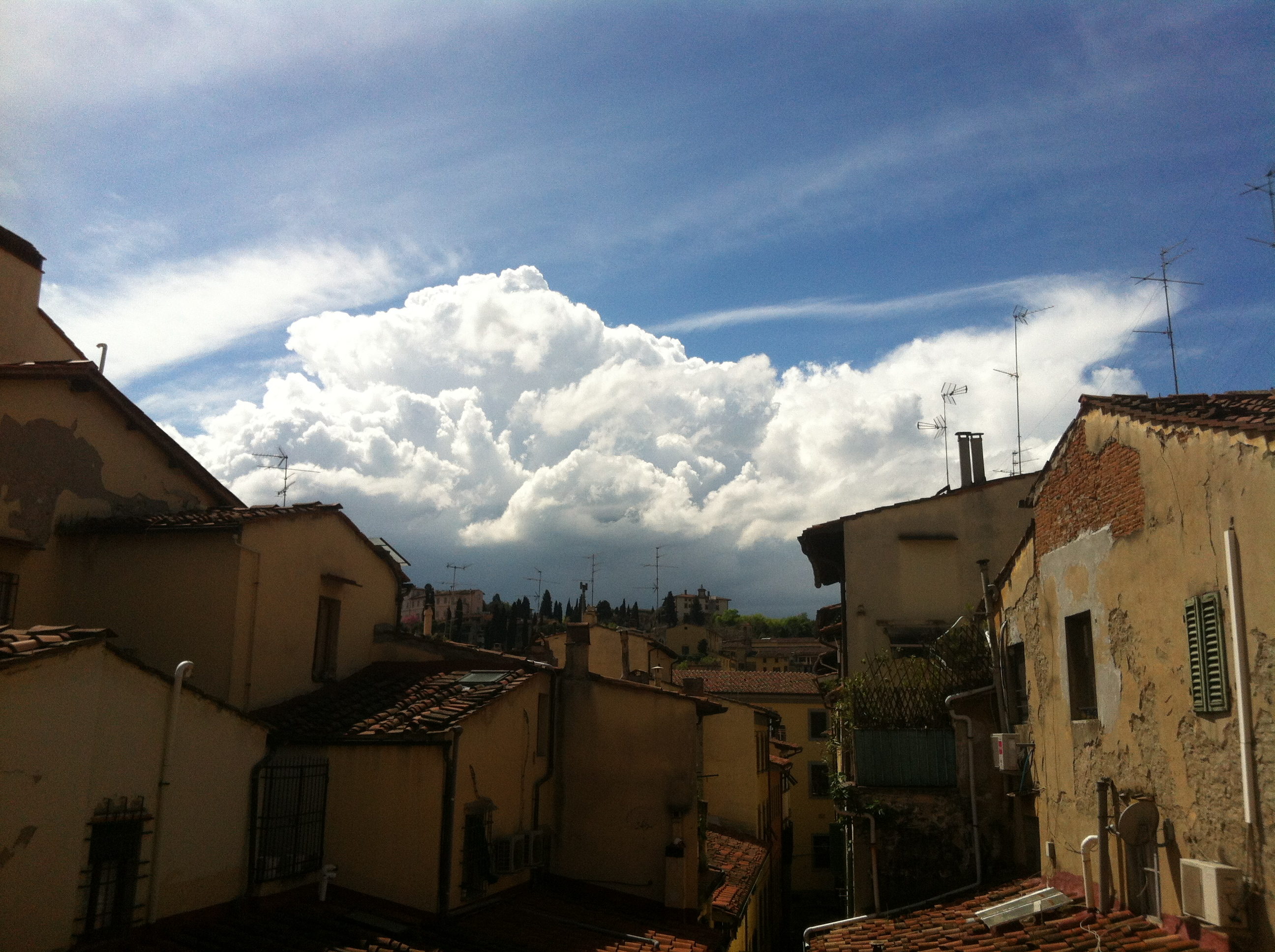 Cumulogenesi pomeridiana di origine termoconvettiva sulle colline del Chianti vista da Firenze nel primo pomeriggio del 22 aprile 2013.